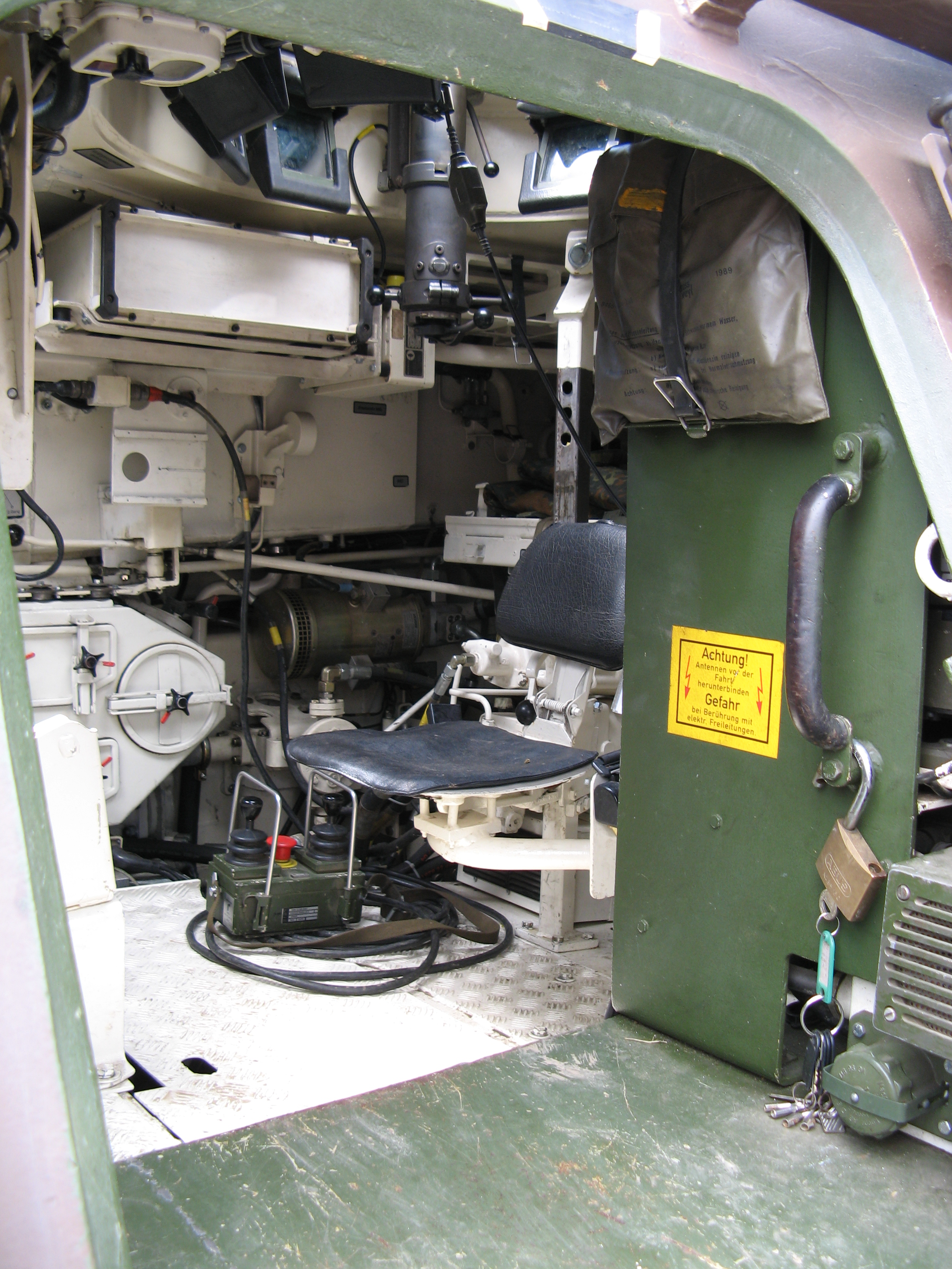 Innenraum des Pionierpanzers Dachs, aufgenommen von schräg vorne